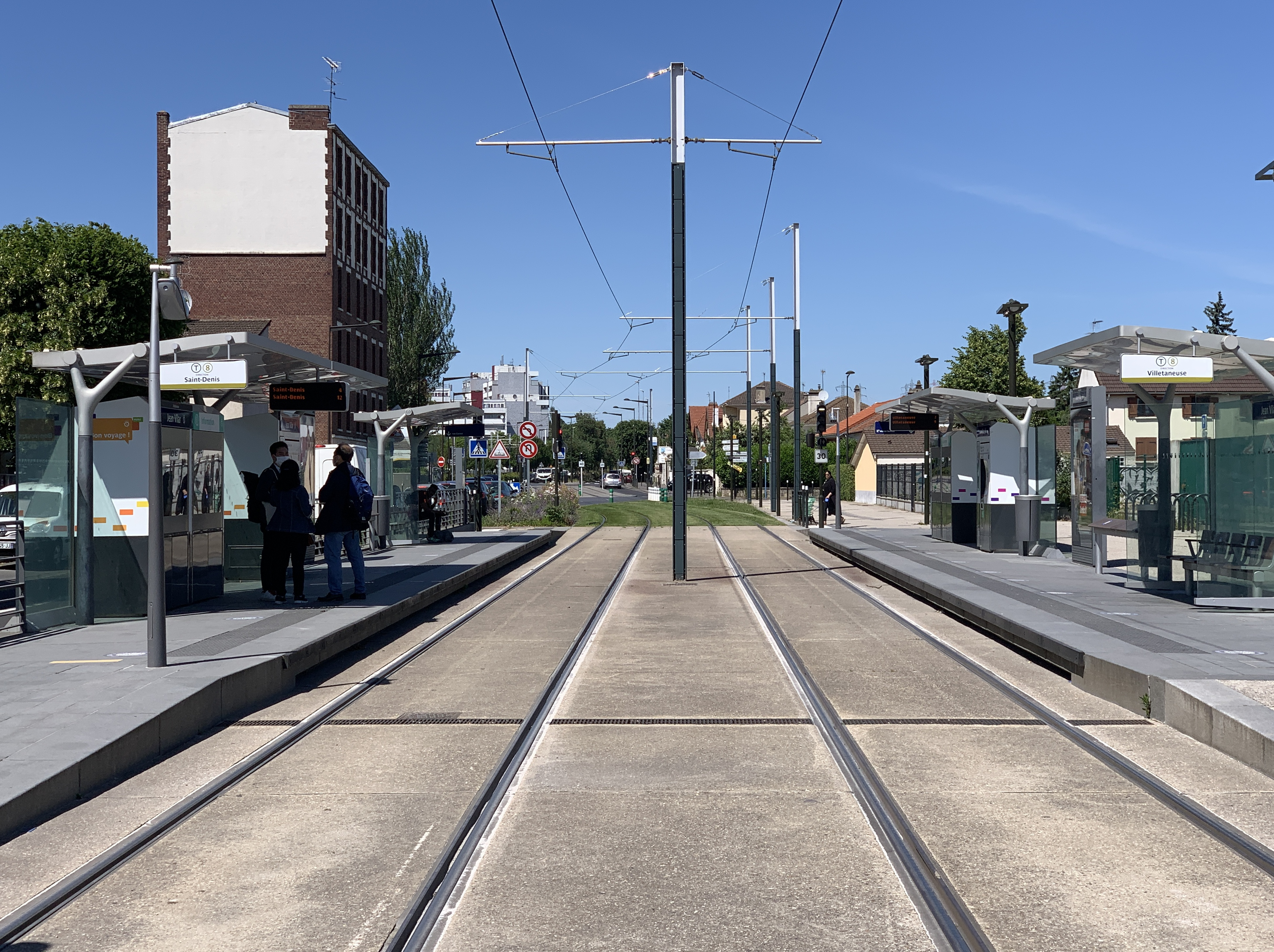 Station de tramway Jean Vilar, ligne 8 du tramway d'Île-de-France, Villetaneuse.